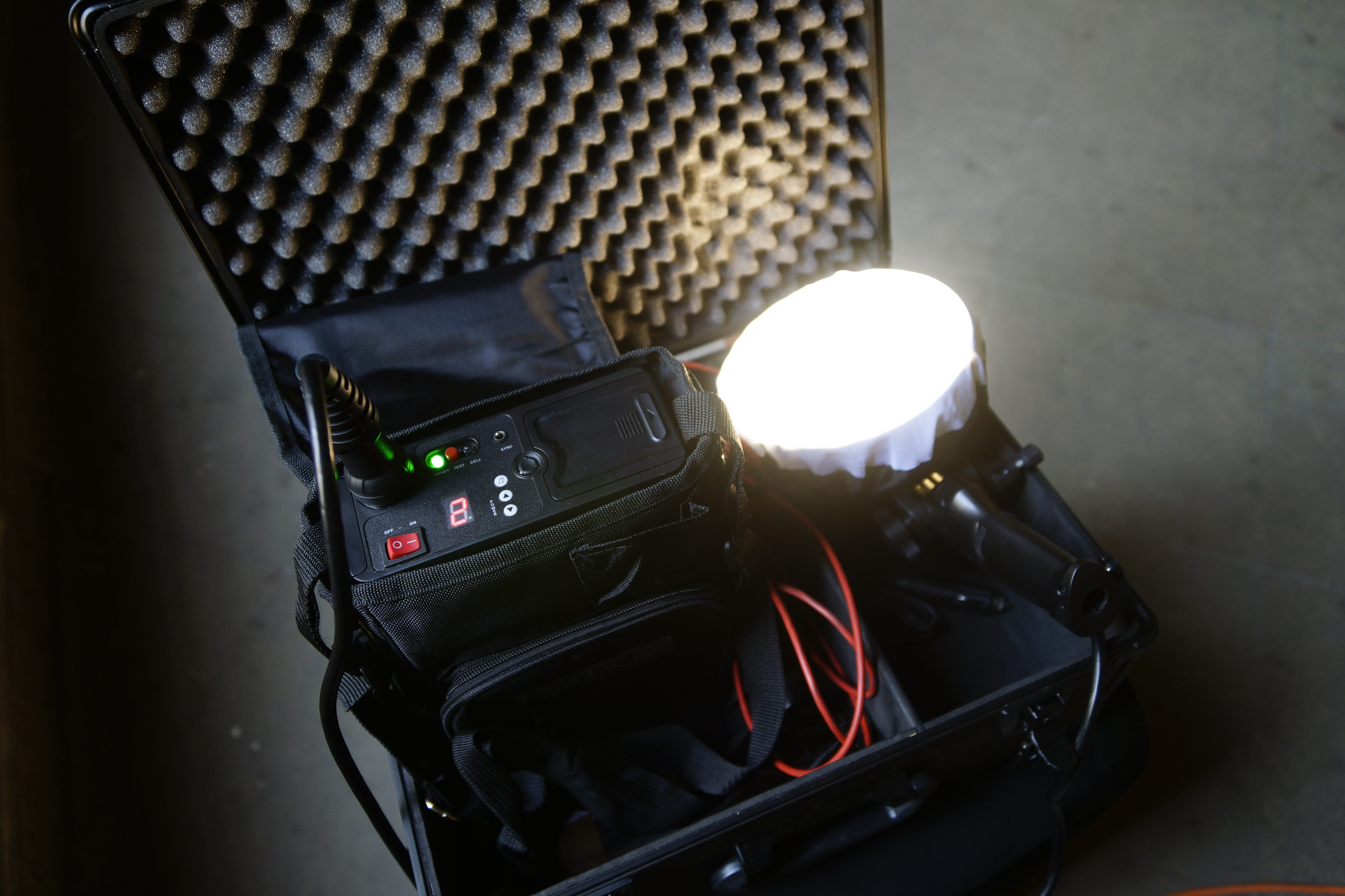 Improvizovaný fotografický ateliér. Generátor se skládá z boxu, ve kterém jsou všechny ovládací prvky pro blesk a samotného bleskového světla (hlava lampy), které jsou propojeny kabelem. Generátor může být položen na podlaze, nebo se připojí k základně stativu. Generátor je obvykle silnější a dražší, což má několik výhod. Například generátory některých výrobců umožňují „zmrazení pohybu“, k jednomu generátoru se může připojit více než jedna lampa. Generátor funguje z elektrické sítě, ale také z baterie, která umožňuje fotografovat venku nebo v místech, kde není možnost připojení zařízení k elektrické síti.